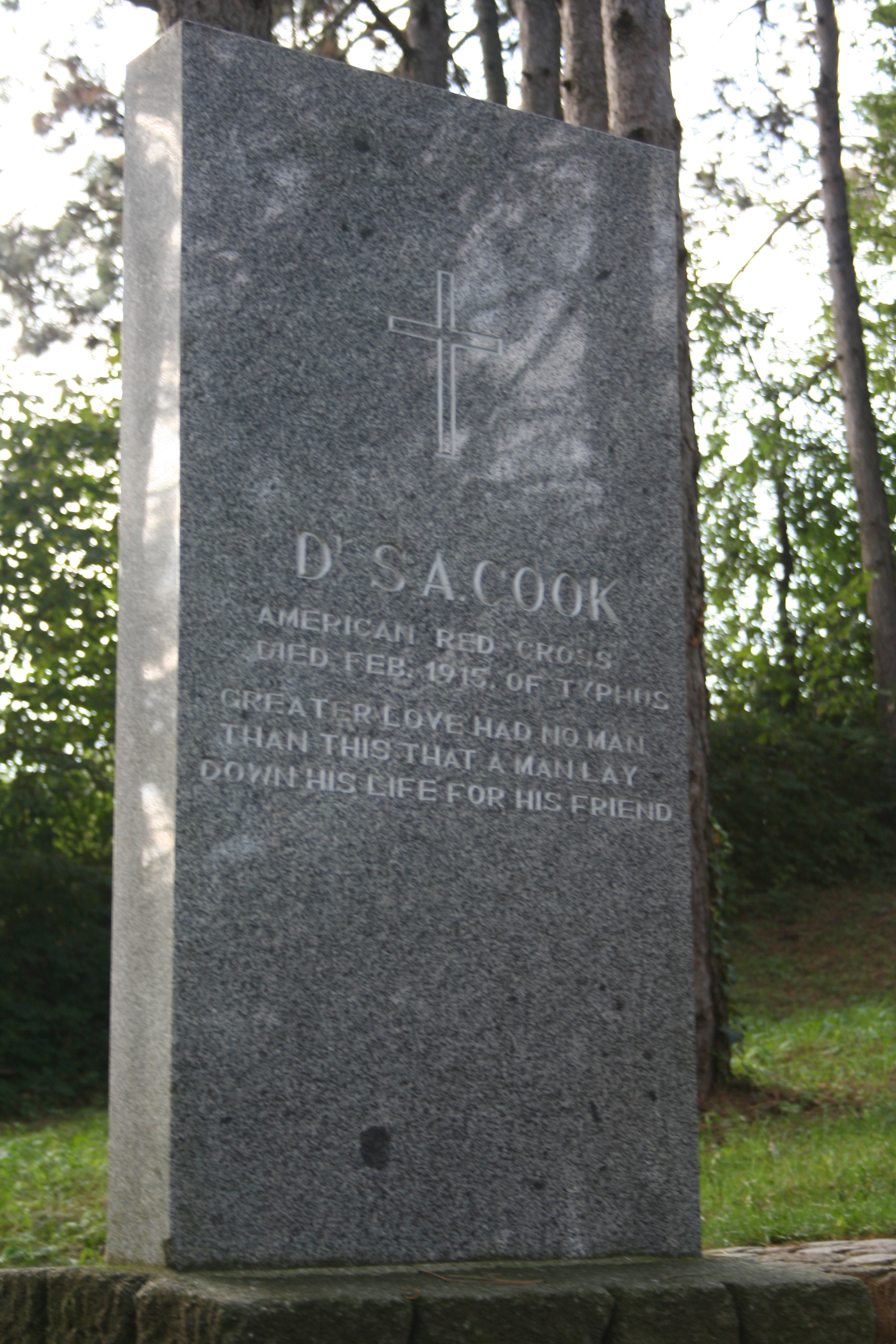 Spomenici Valjevo